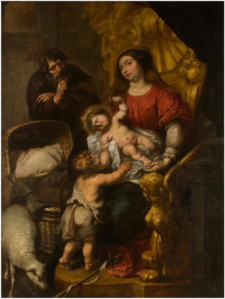 La obra representa a los tres miembros de la Sagrada Familia cristiana.